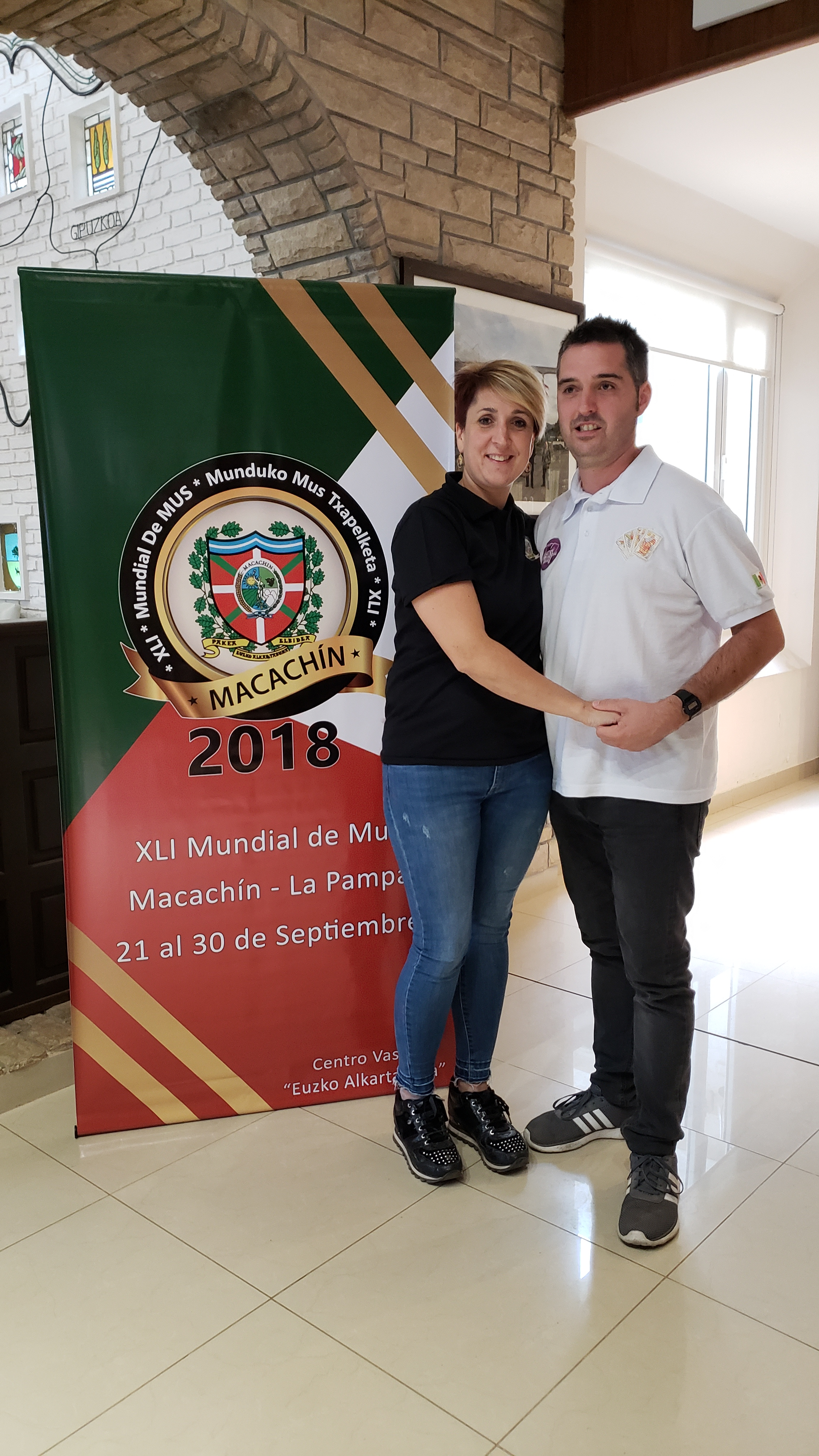 Ganadores Mundial de Mus Macachín 2018